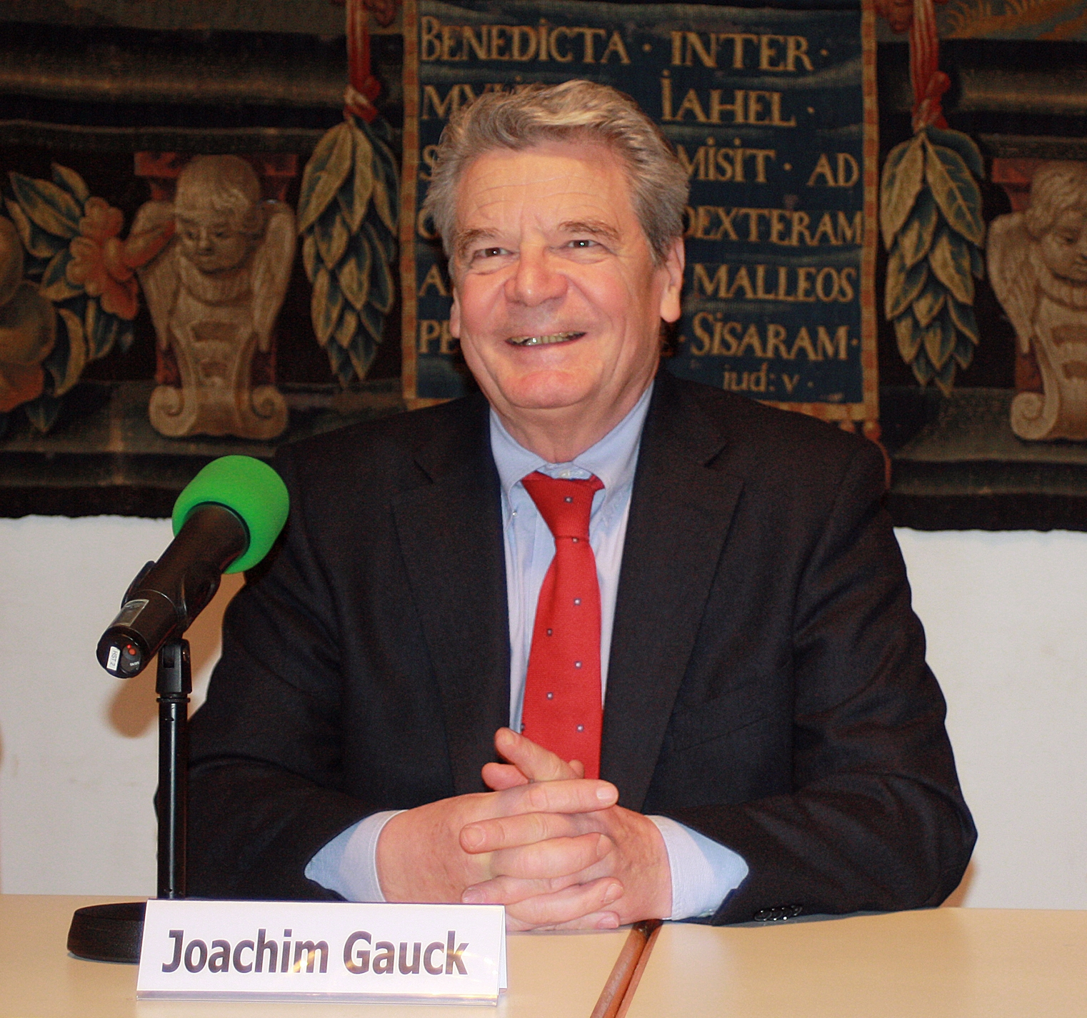 Joachim Gauck, deutscher evangelischer Pastor, kandidierte im Jahr 2010 erfolglos für das Amt des Präsidenten der Bundesrepublik Deutschland. Hier am 29.11.2010 in München.